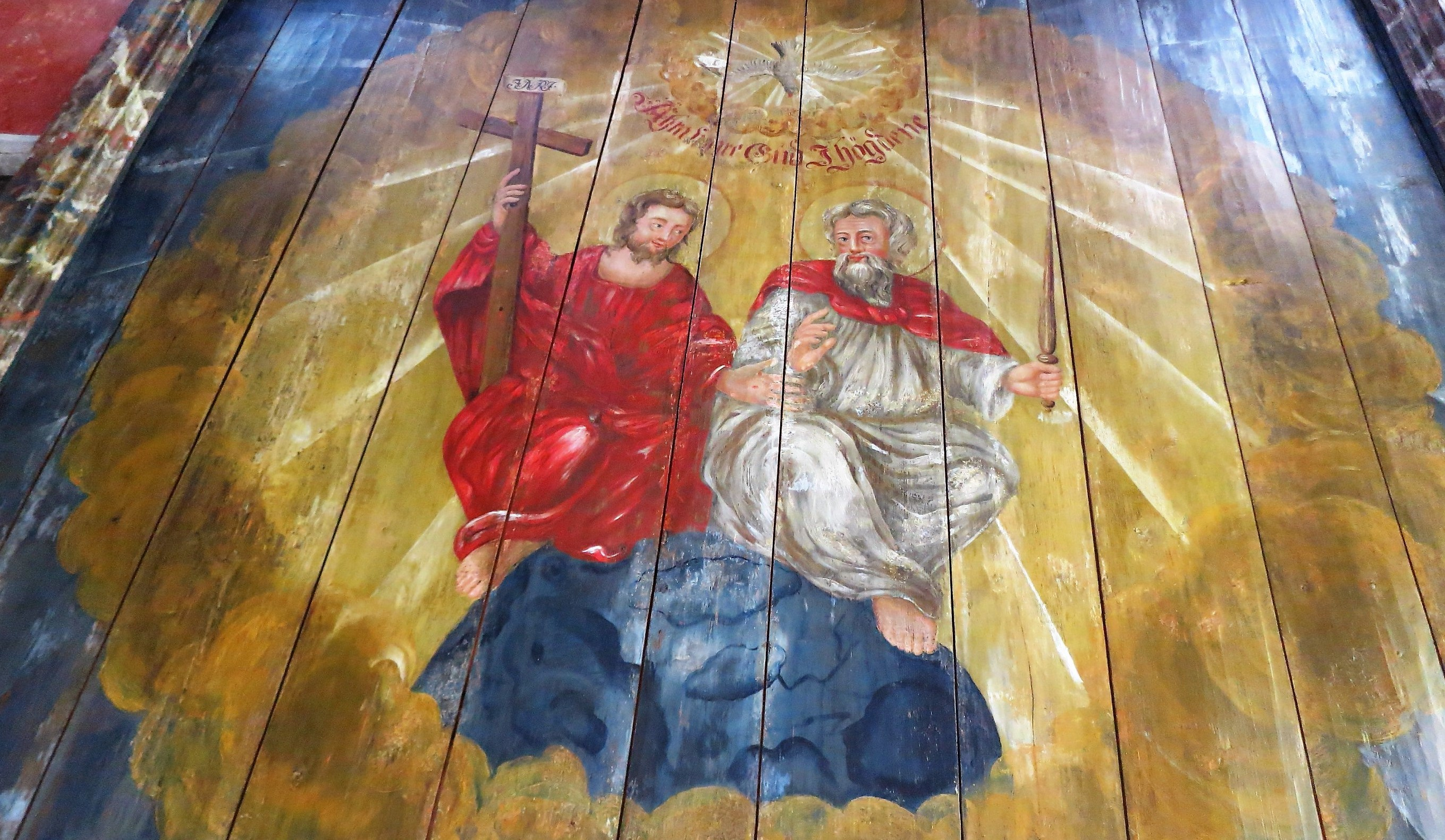 Takmålning i koret i Norra Hestra kyrka, Växjö stift, Småland